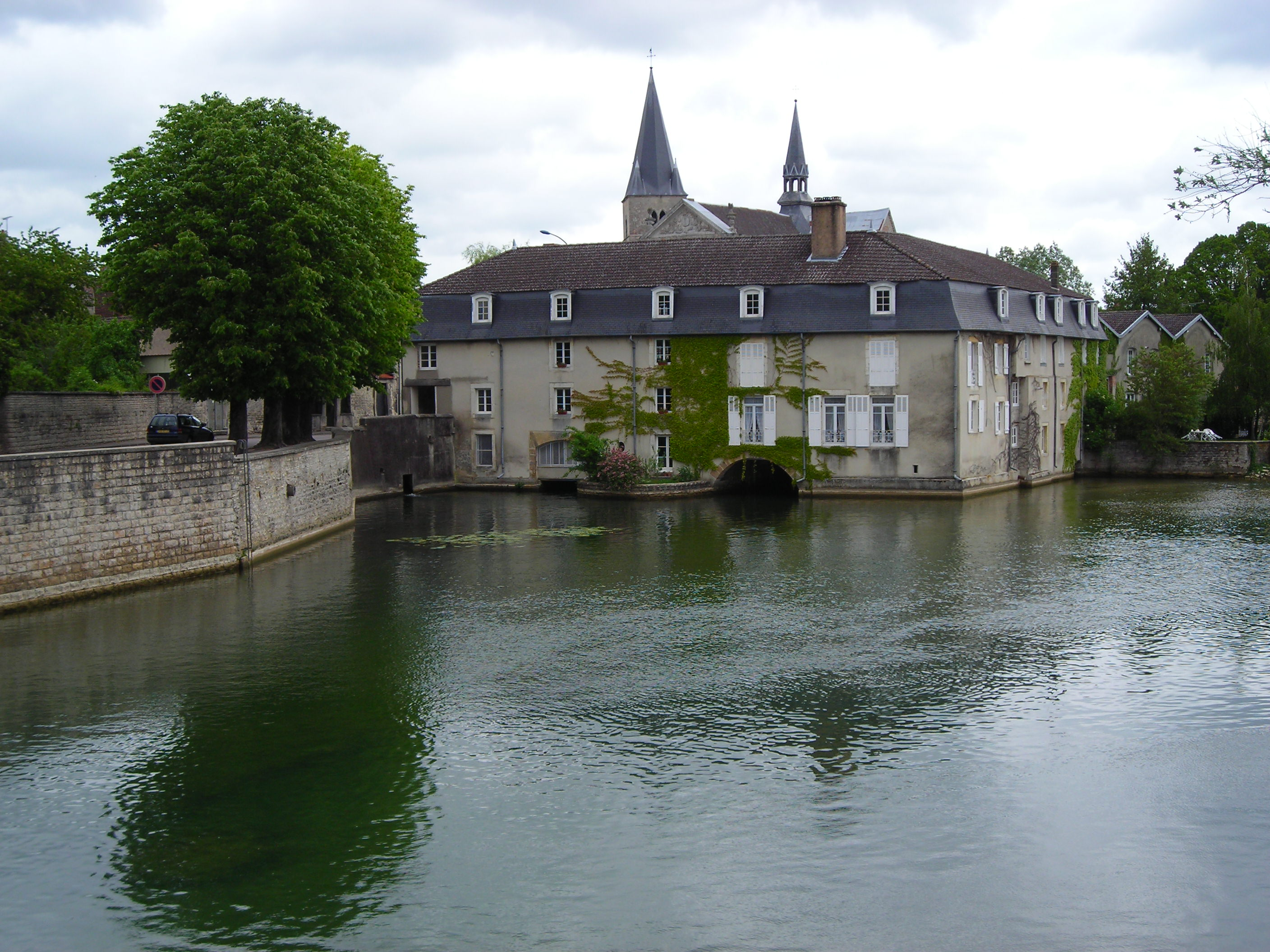 La rivière Aube traversant Bar-sur-Aube (Aube, France).